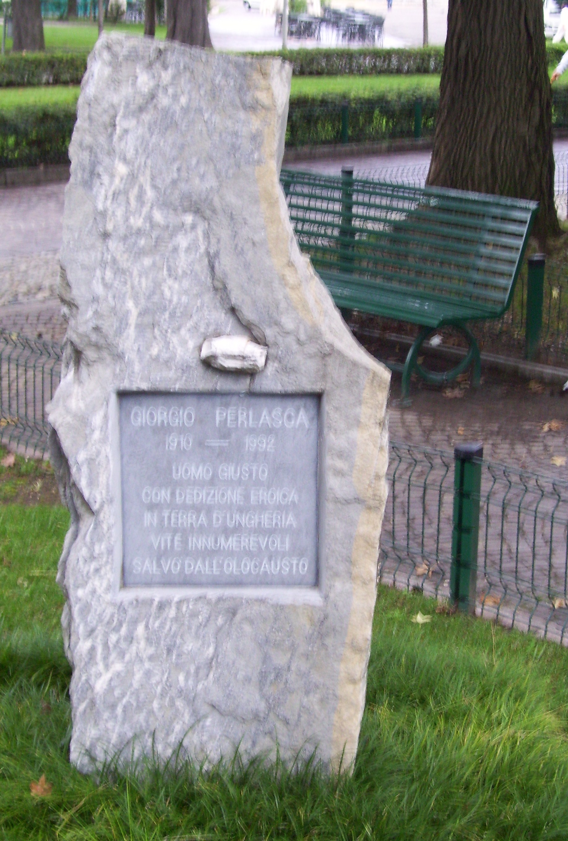 Monumento a Giorgio Perlasca presso i giardini a lago